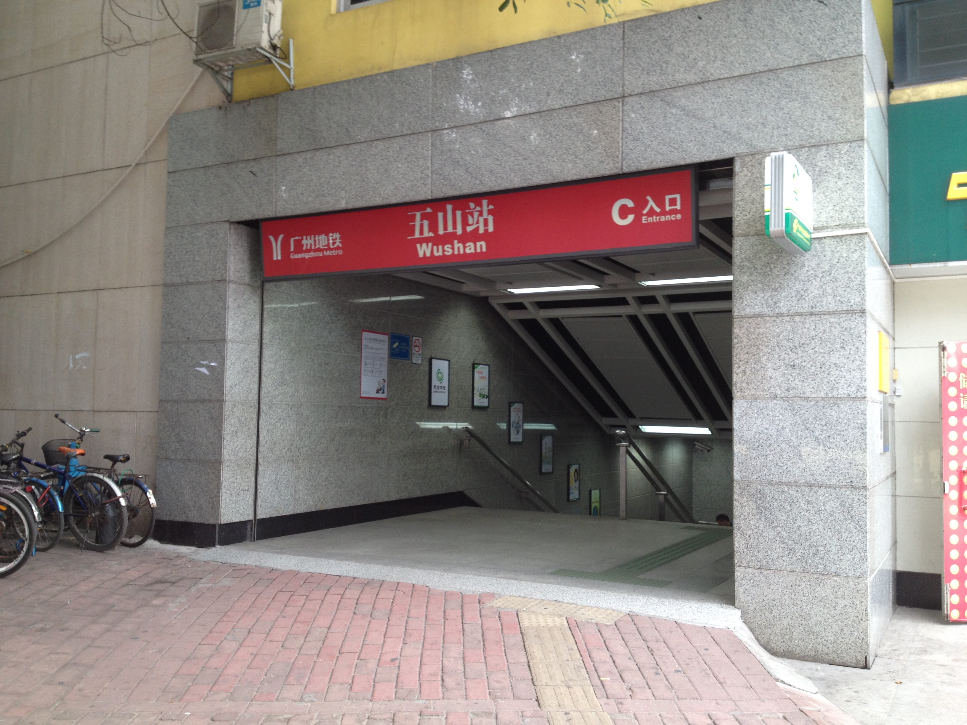 广州地铁五山站C出入口